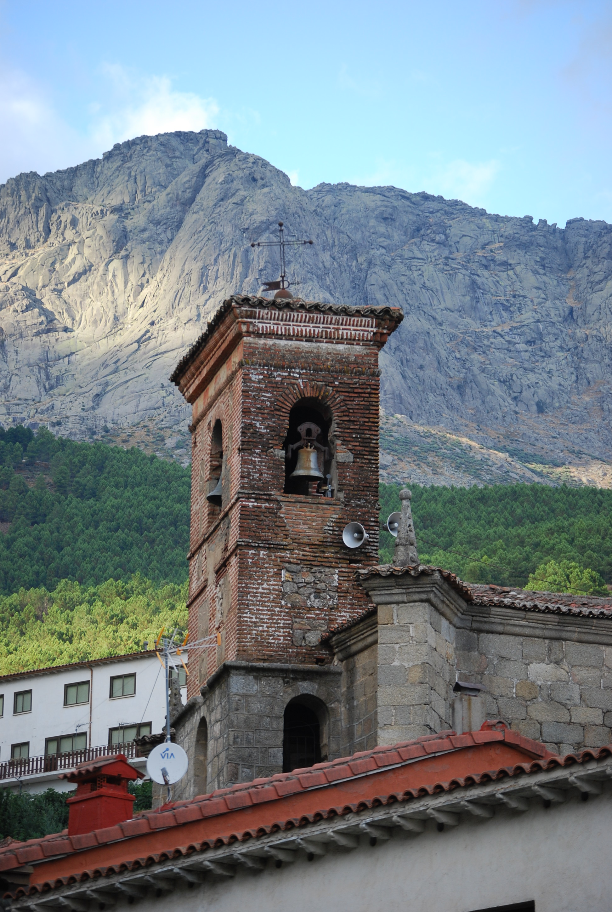 Vista de la torre de la Iglesia con la montaña al fondo